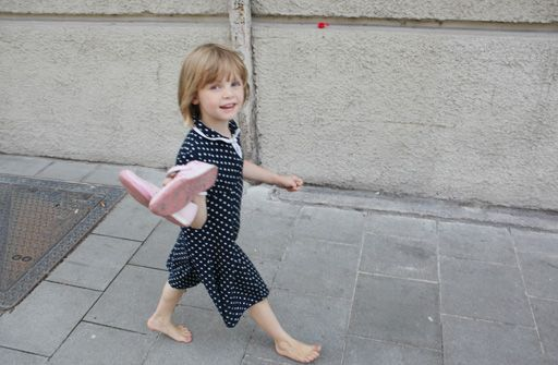 Children playing seen by Andreas Bohnenstengel